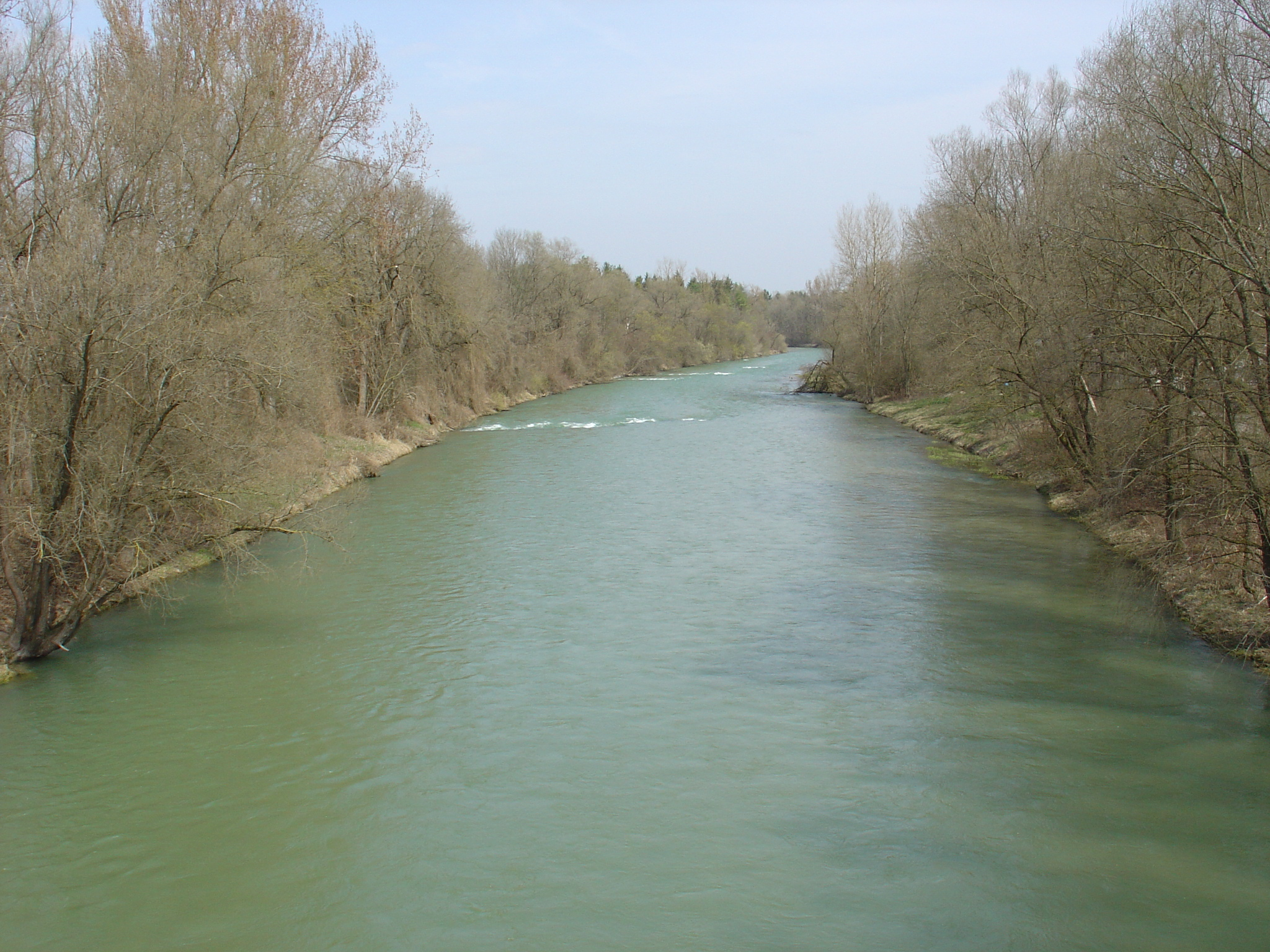 Alz bei Emmerting Eigenes Bild (Wissen)# April 2005